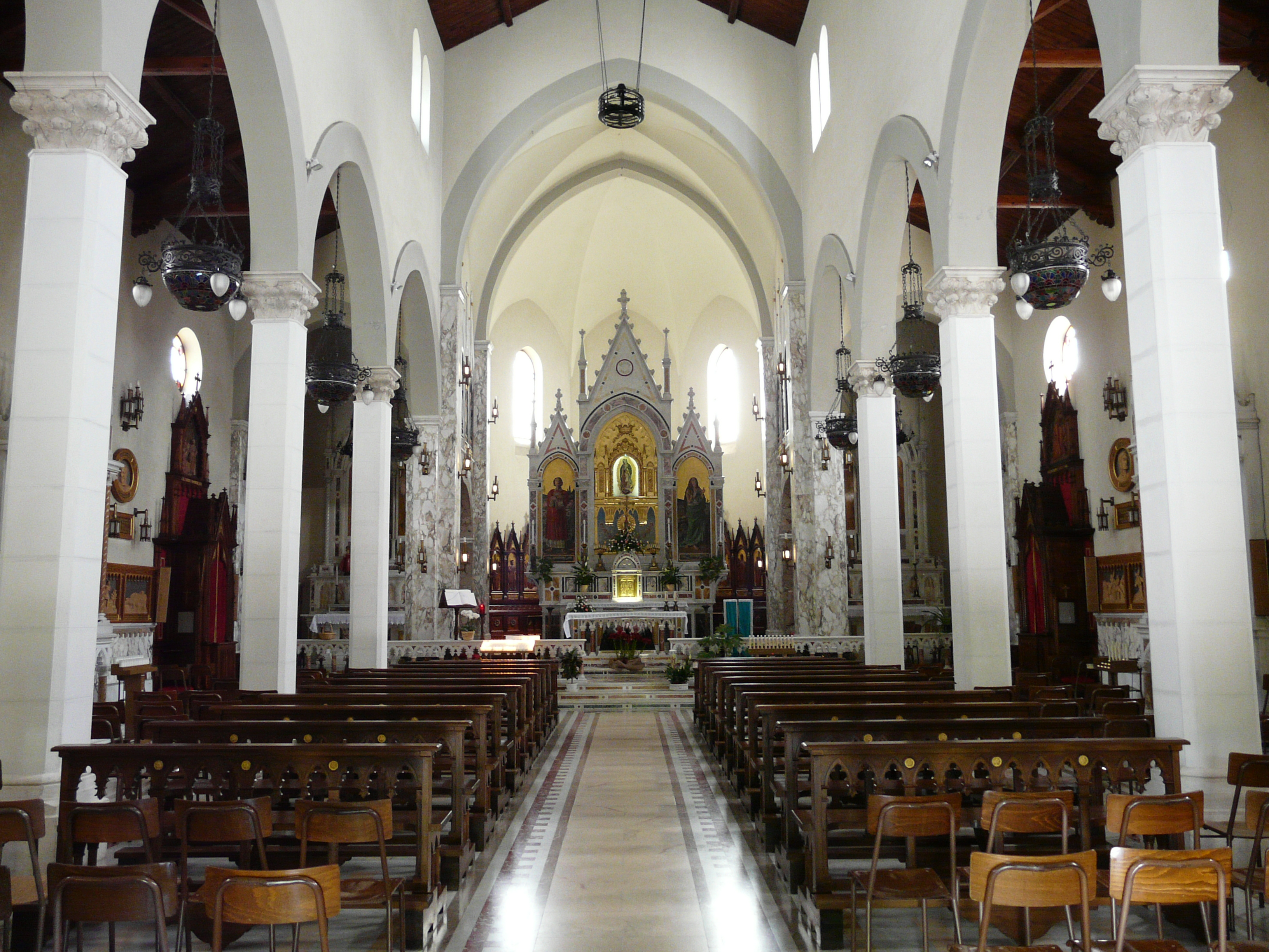 Navata centrale del santuario della Madonna di Guadalupe, Santo Stefano d'Aveto, Liguria, Italia